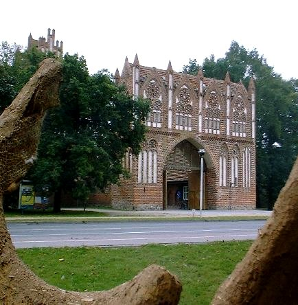 das Treptower Tor in Neubrandenburg